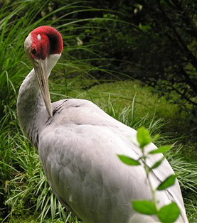 Grus antigone